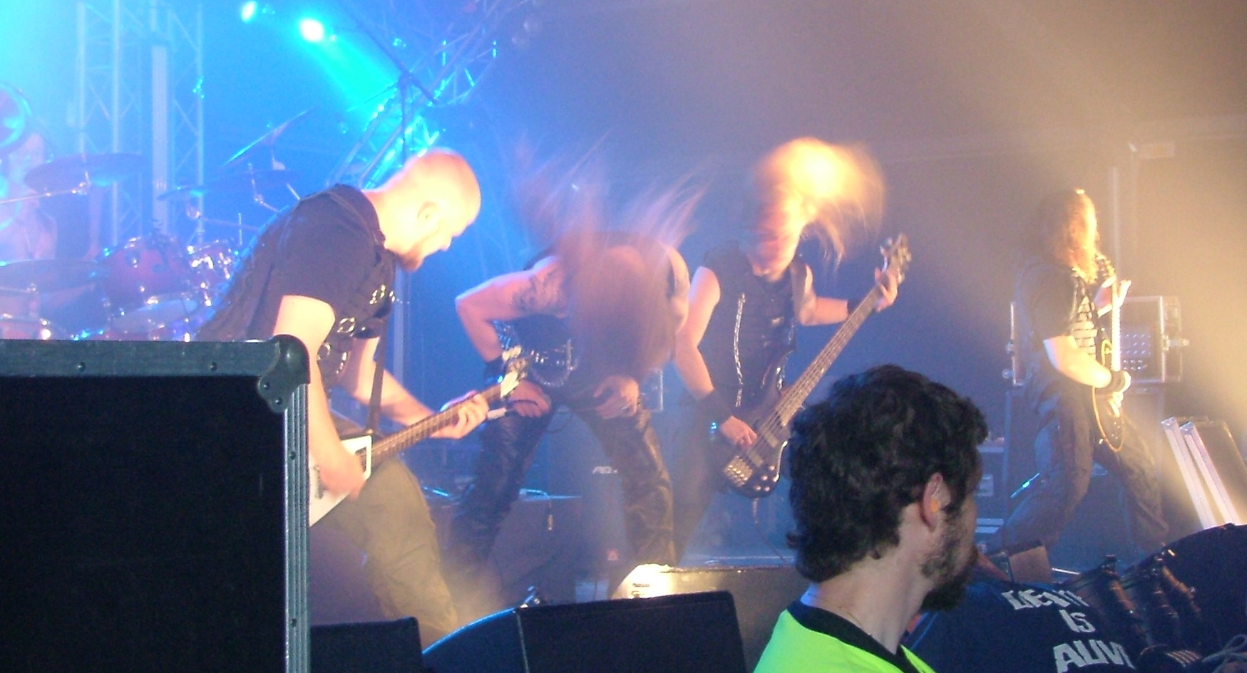 Die finnische Dark-Metal-Band Shade Empire beim Tuska Open Air 2008